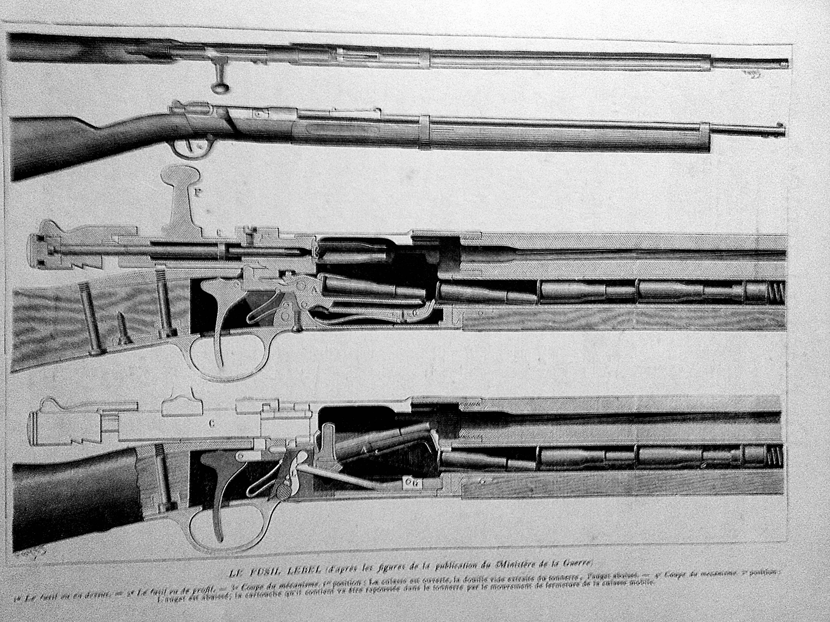 planche en coupe du fusil lebel